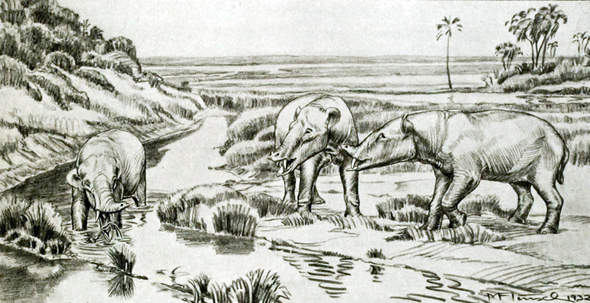 Phiomia osborni.